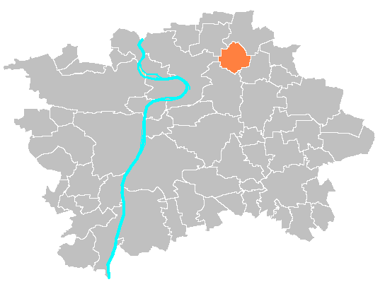 Location map municipal district Prague